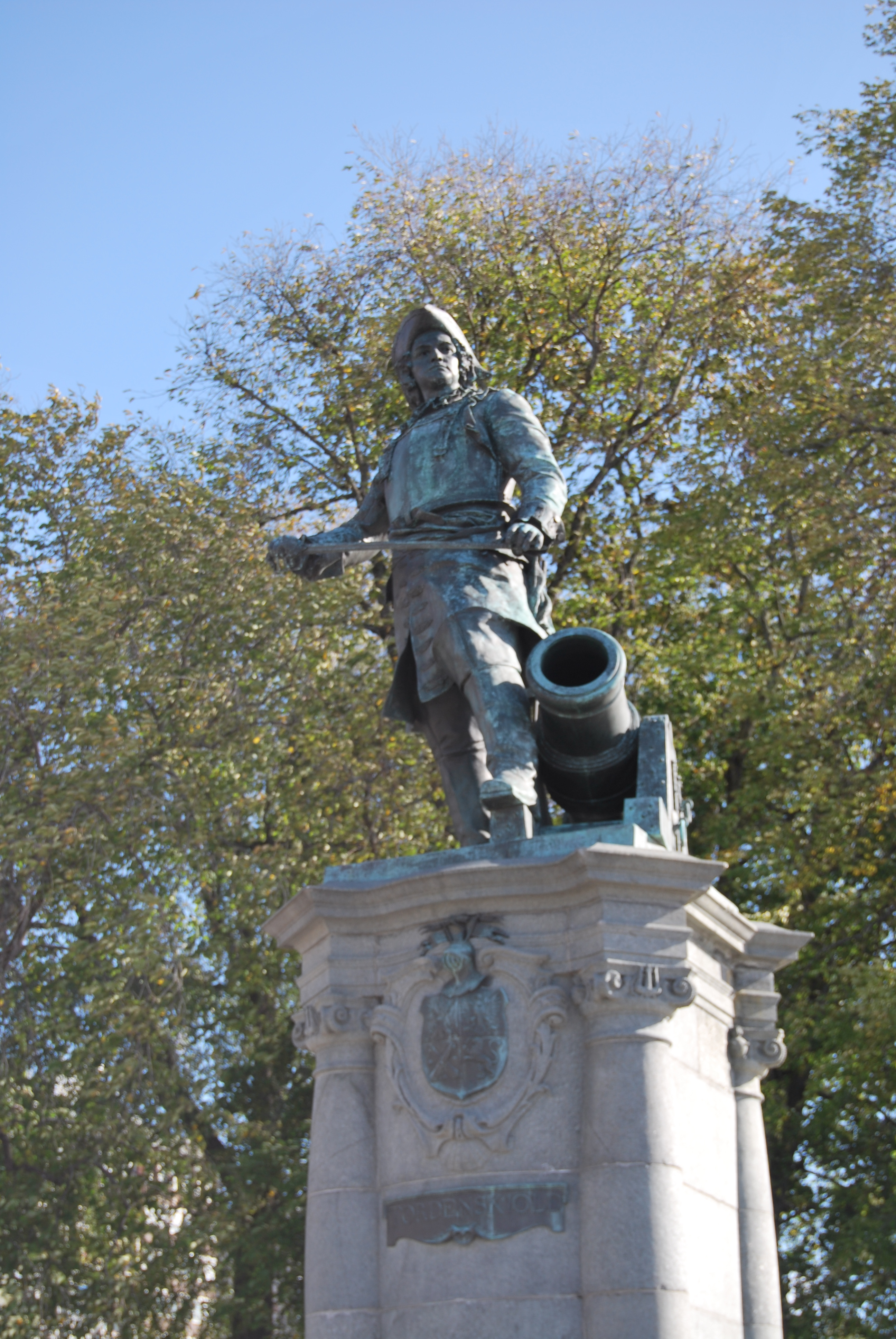 Oslo, Norwegia, Tordenskiold-pomnik Petera Wessela Tordenskiolda